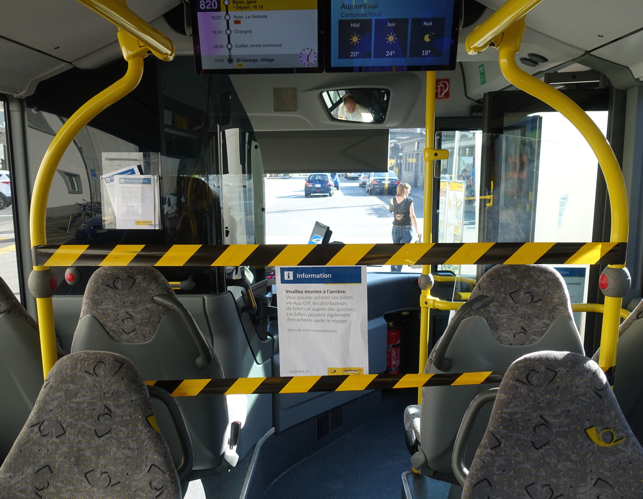 Restrictions d'accès dans le bus Nyon - Saint-George durant le COVID-19. Les billets doivent être achetés au guichet ou au distributeur, aussi après le voyage.